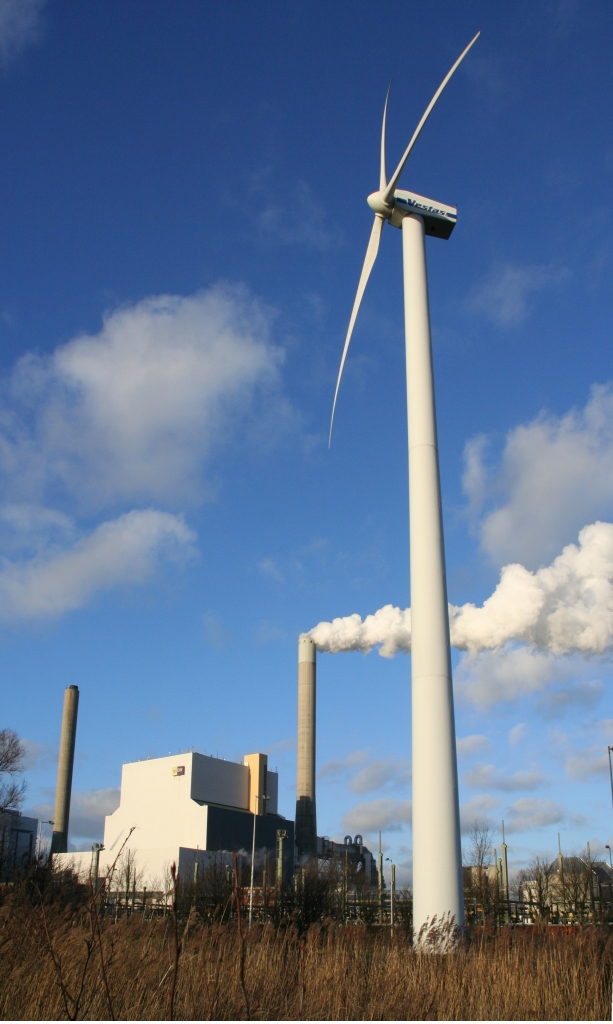 Éolienne et centrale thermique Nuon à Sloterdijk (Amsterdam) La centrale a une capacité de 1229MW soit 614 fois la capacité de l'éolienne au premier plan